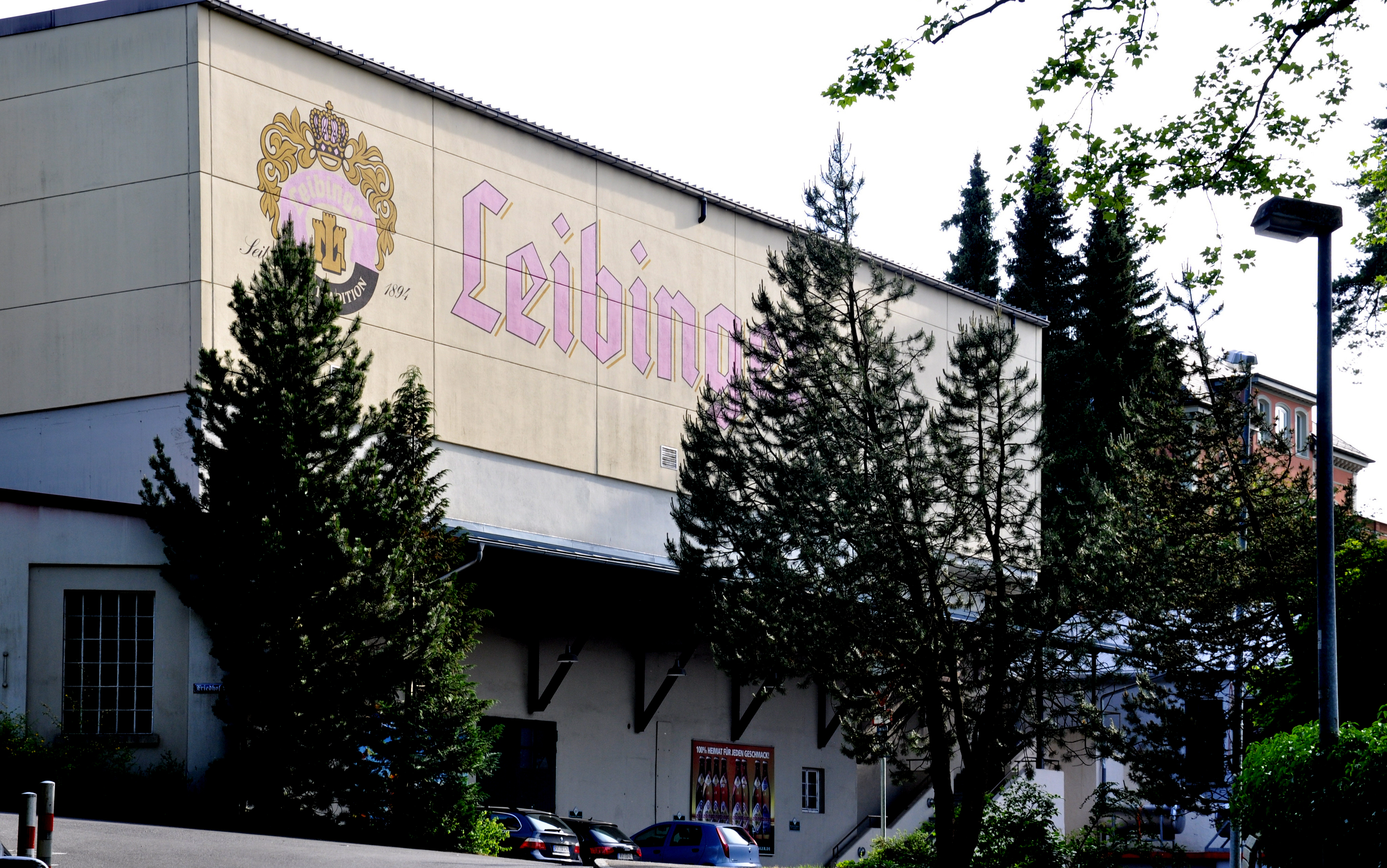 Ravensburg, Brauerei Leibinger (Friedhofstraße)